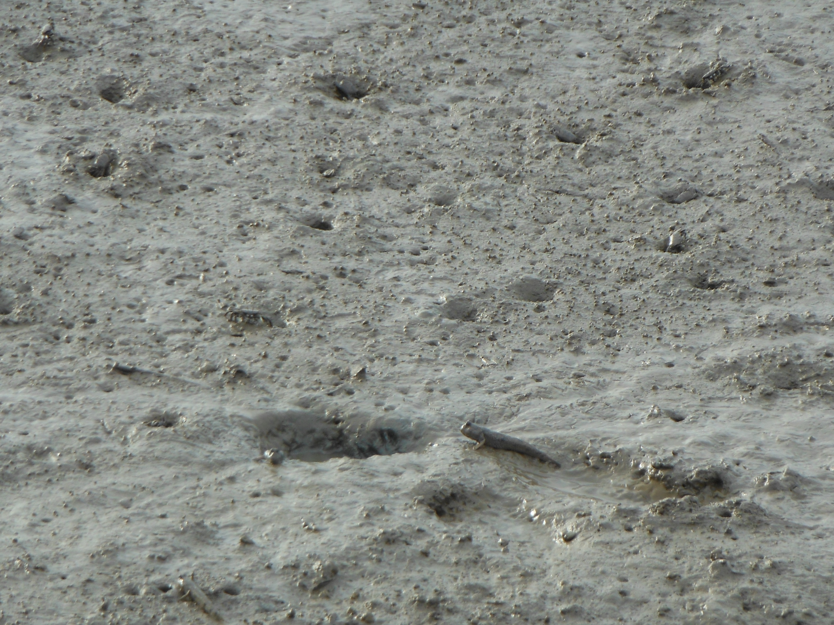 Crabs and Gobioideis on mudflat, in Kashima city, Saga prefecture, Japan.